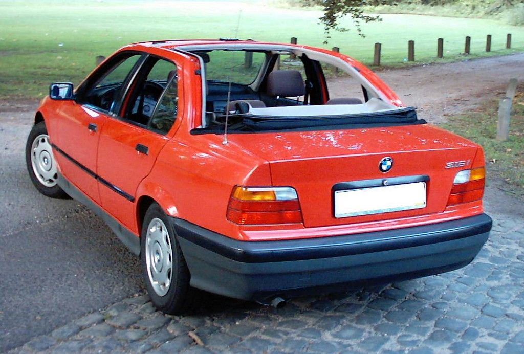 BMW BAUR Landaulet TC4